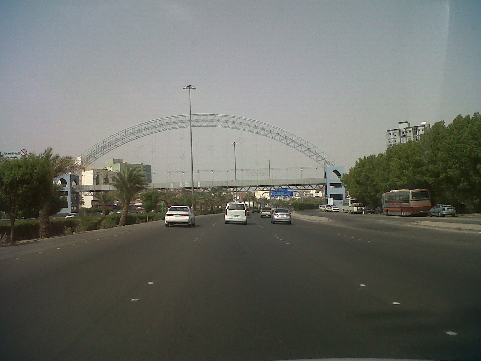 al sateen